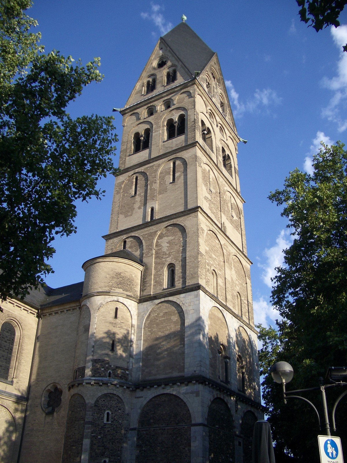 Kirche St. Aposteln in Köln. Westturm mit Treppenturm.